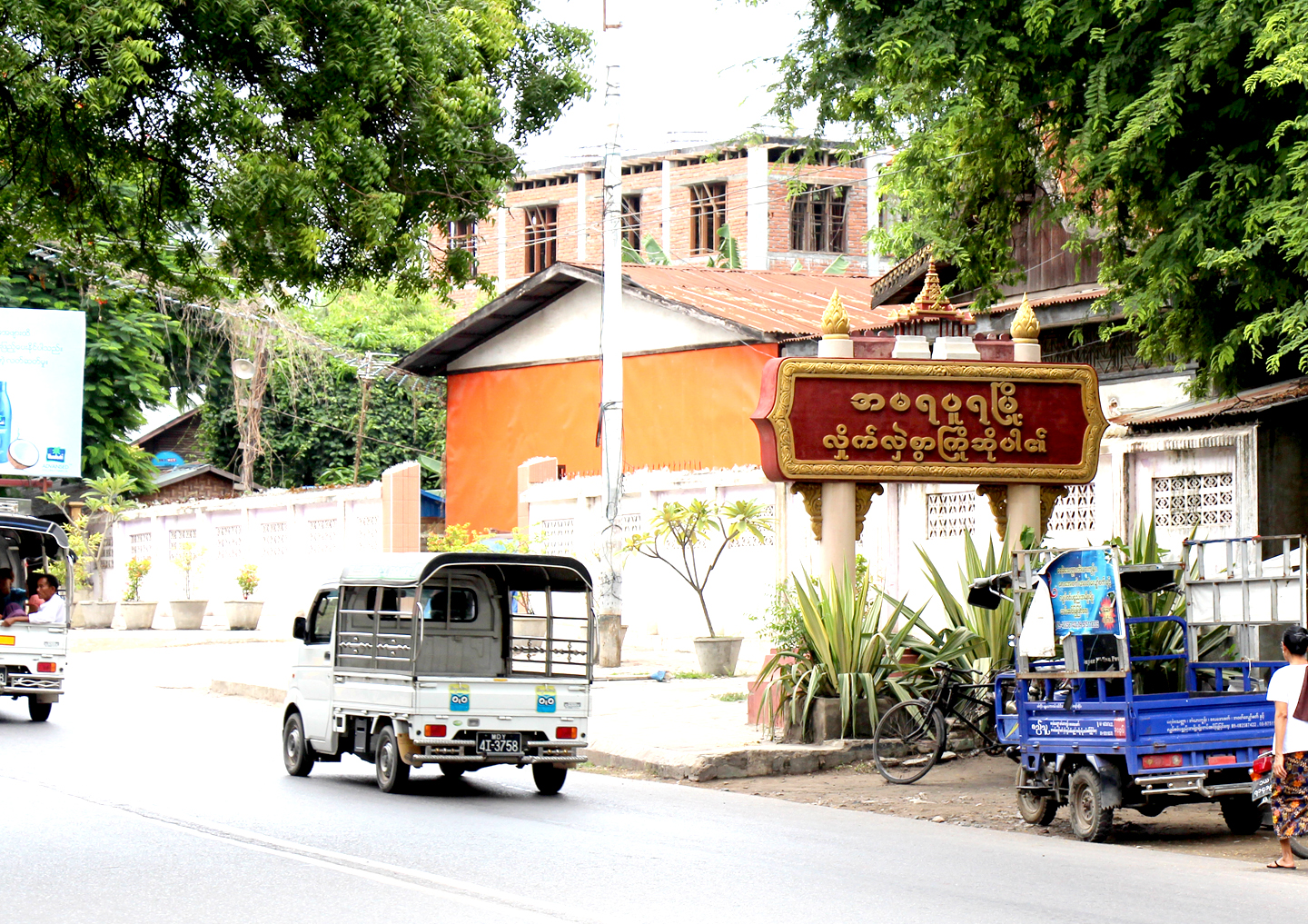 မြန်မာဘာသာ: အမရပူရမြို့အဝင် (မန္တလေး-စစ်ကိုင်းလမ်း)